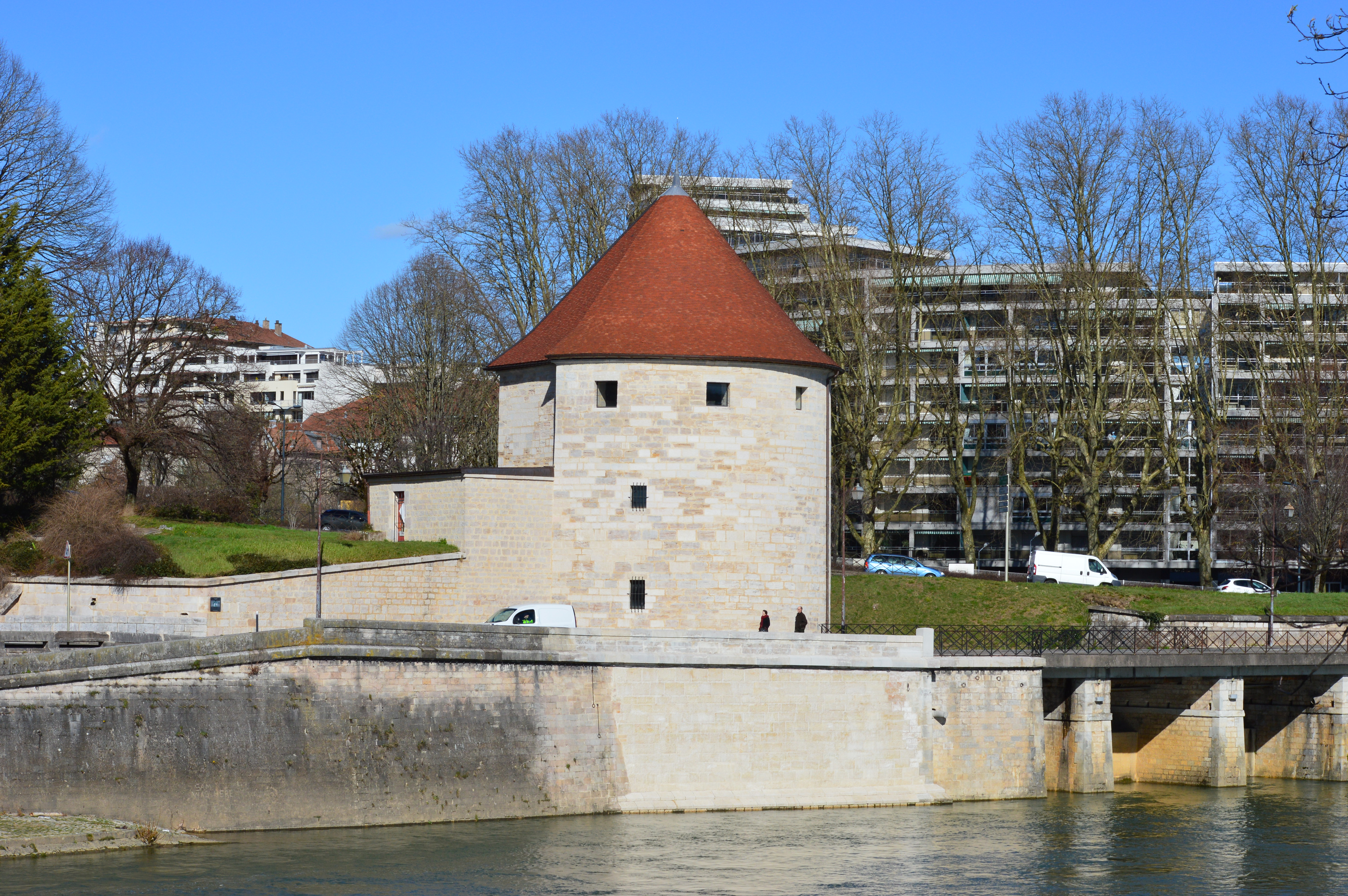 La tour de la Pelote de Besançon, après sa restauration suite à un incendie.